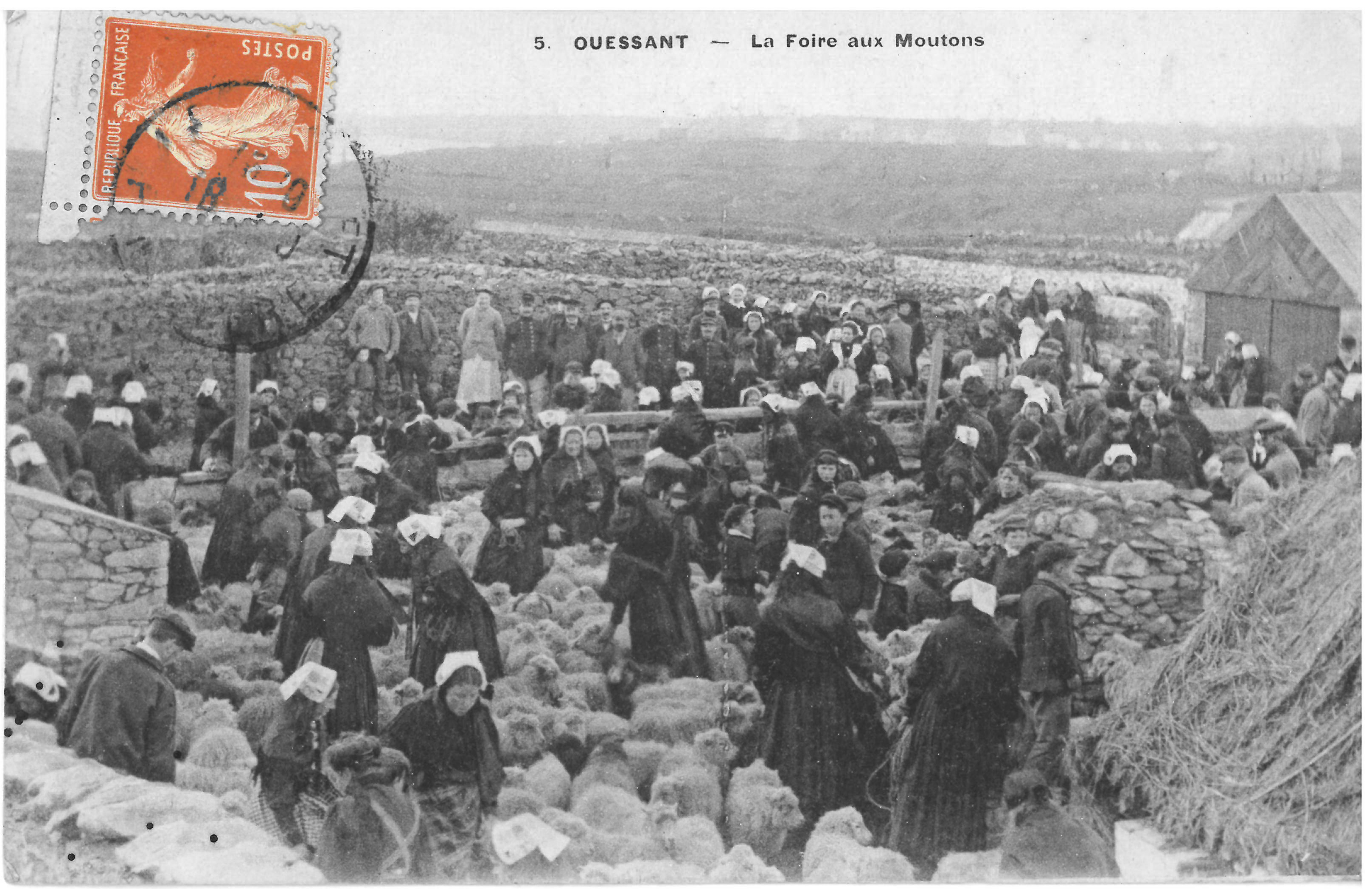 Schafmarkt auf Ouessant - historische Bildpostkarte - Poststempel vom 18.10.1913 Le Conquet Finistère